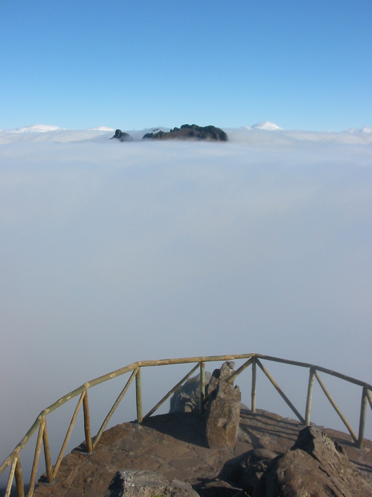 View from Pico Do Areiro to Pico Ruivo, Madeira